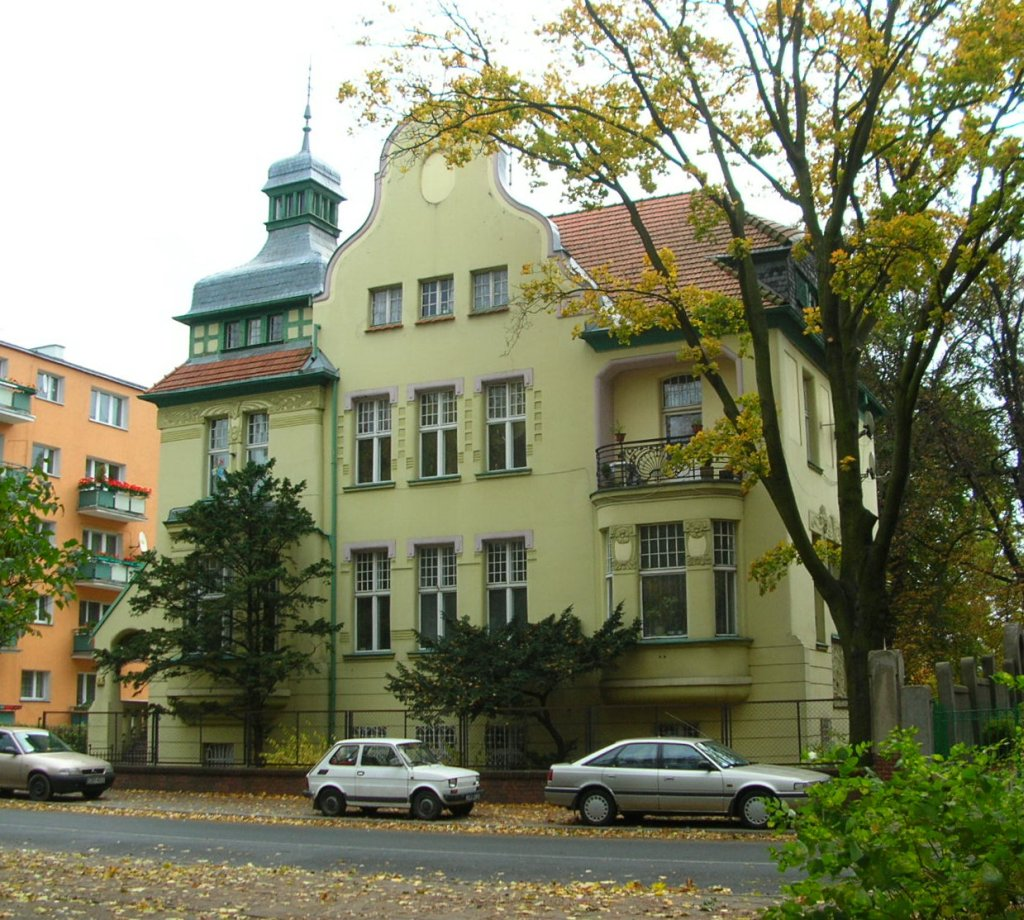 Secesyjna willa - ul. Paderewskiego w Bydgoszczy, proj. Rudolf Kern